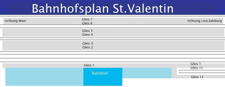 Gleisplan Bahnhof St.Valentin